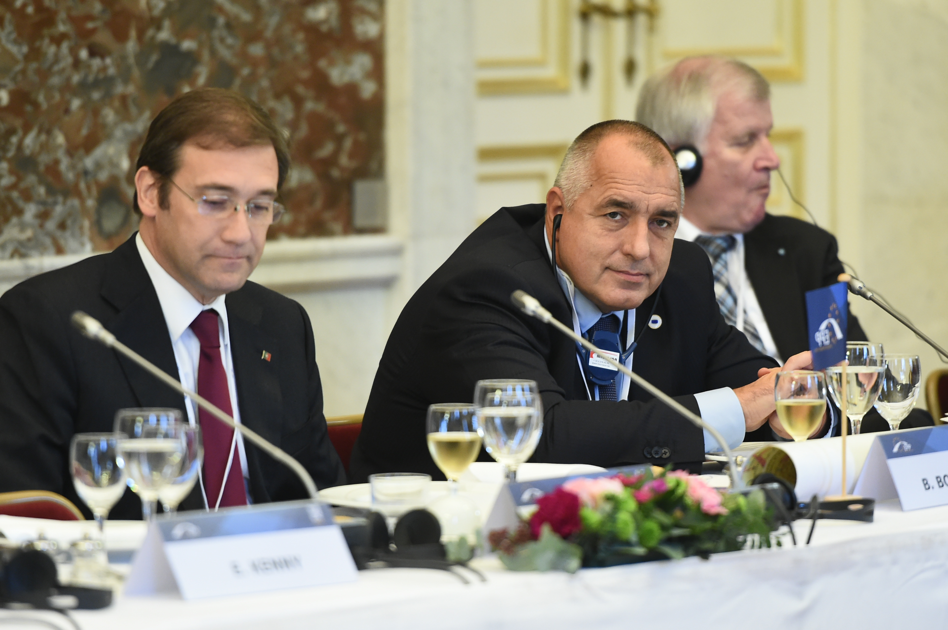 EPP Summit, Brussels; December 2014